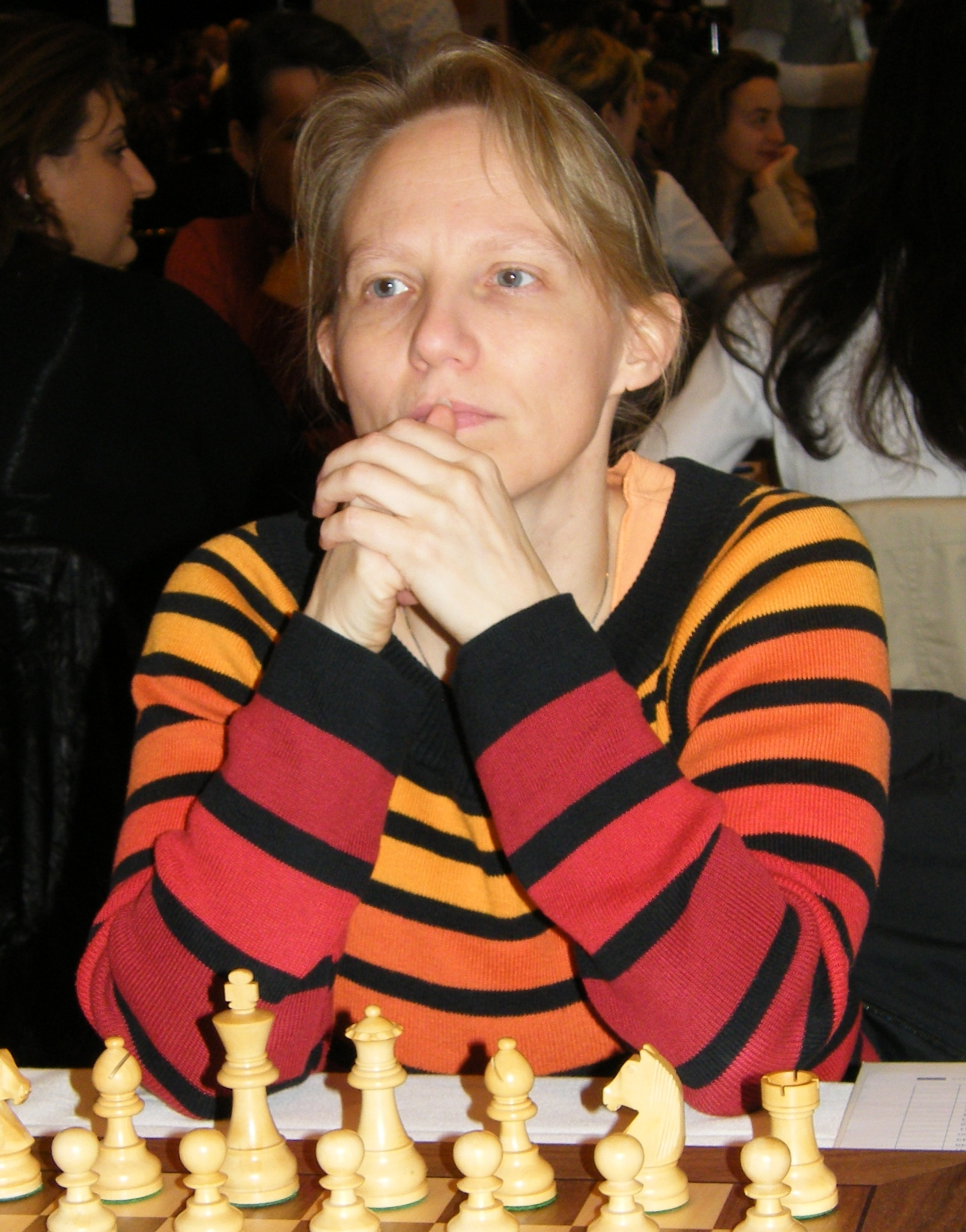 Petra Schuurman bei der 38. Schacholympiade in Dresden 2008